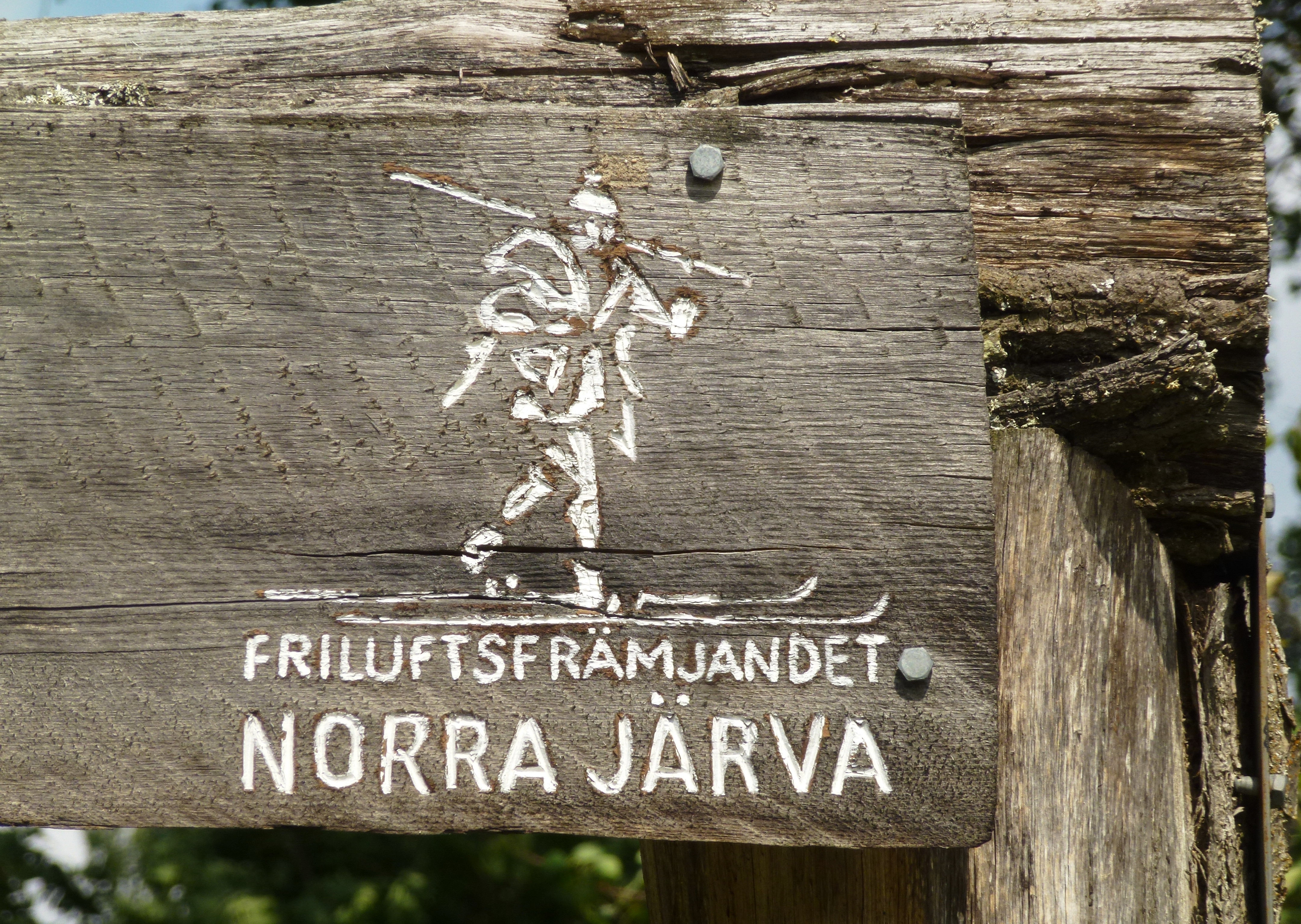 Friluftsfrämjandets logo på en skylt vid Norra Järvafältet